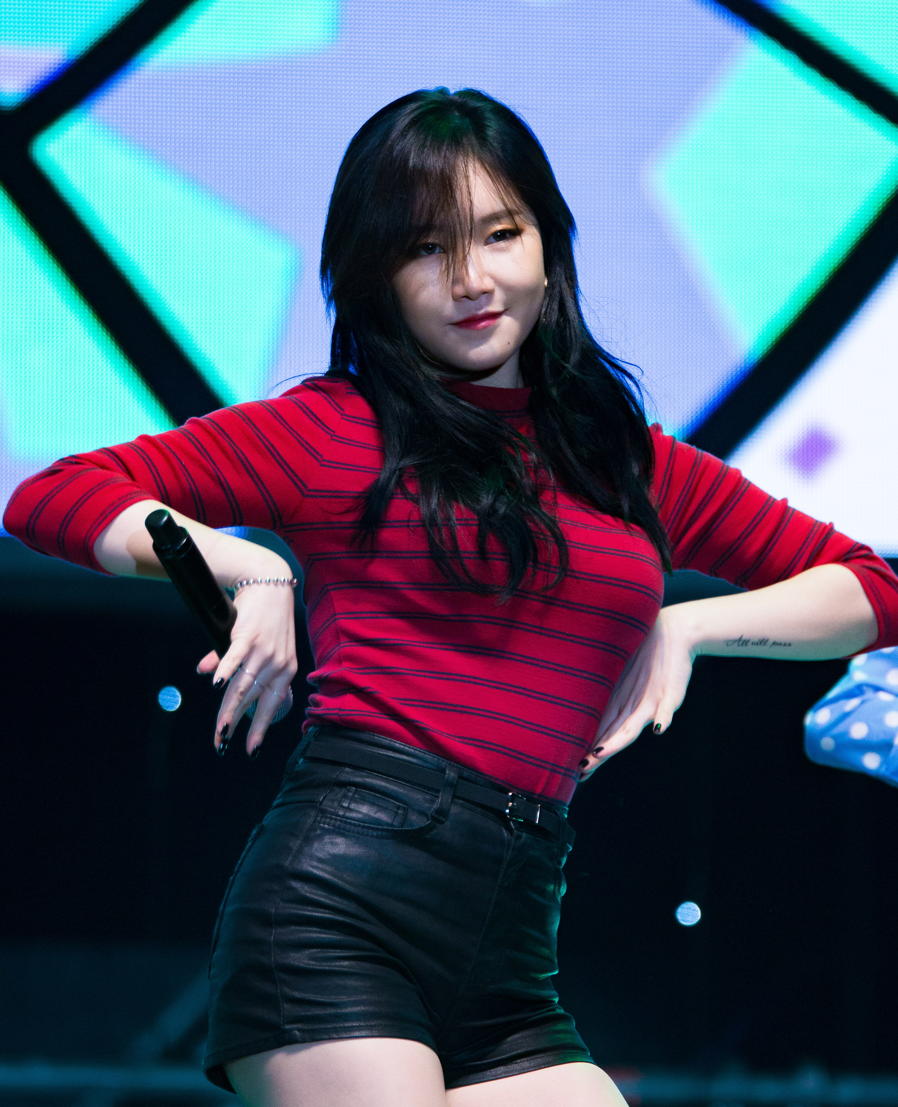 20161009 피에스타 김창렬의 올드스쿨 공개방송